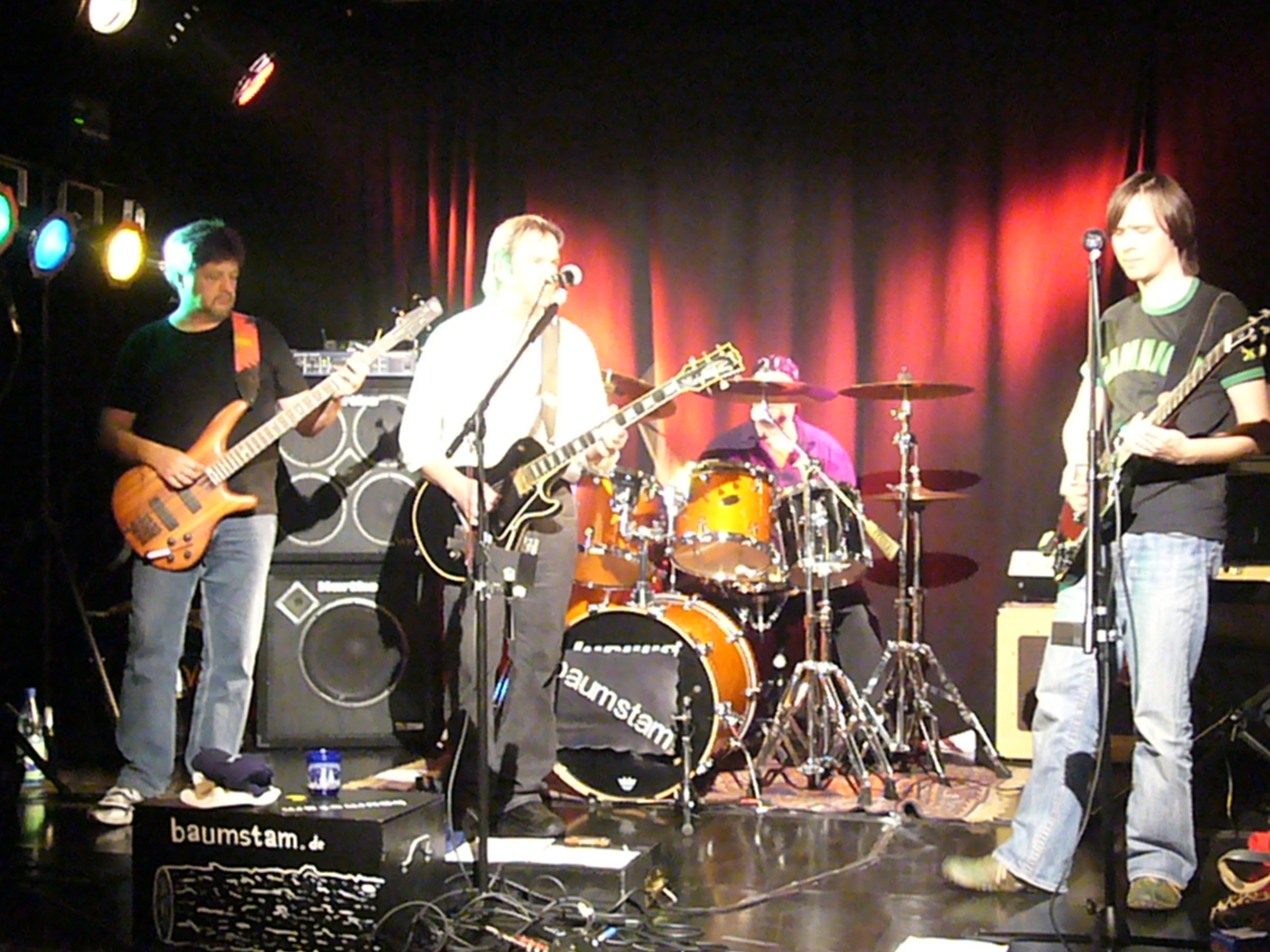 コンサートのひとコマ